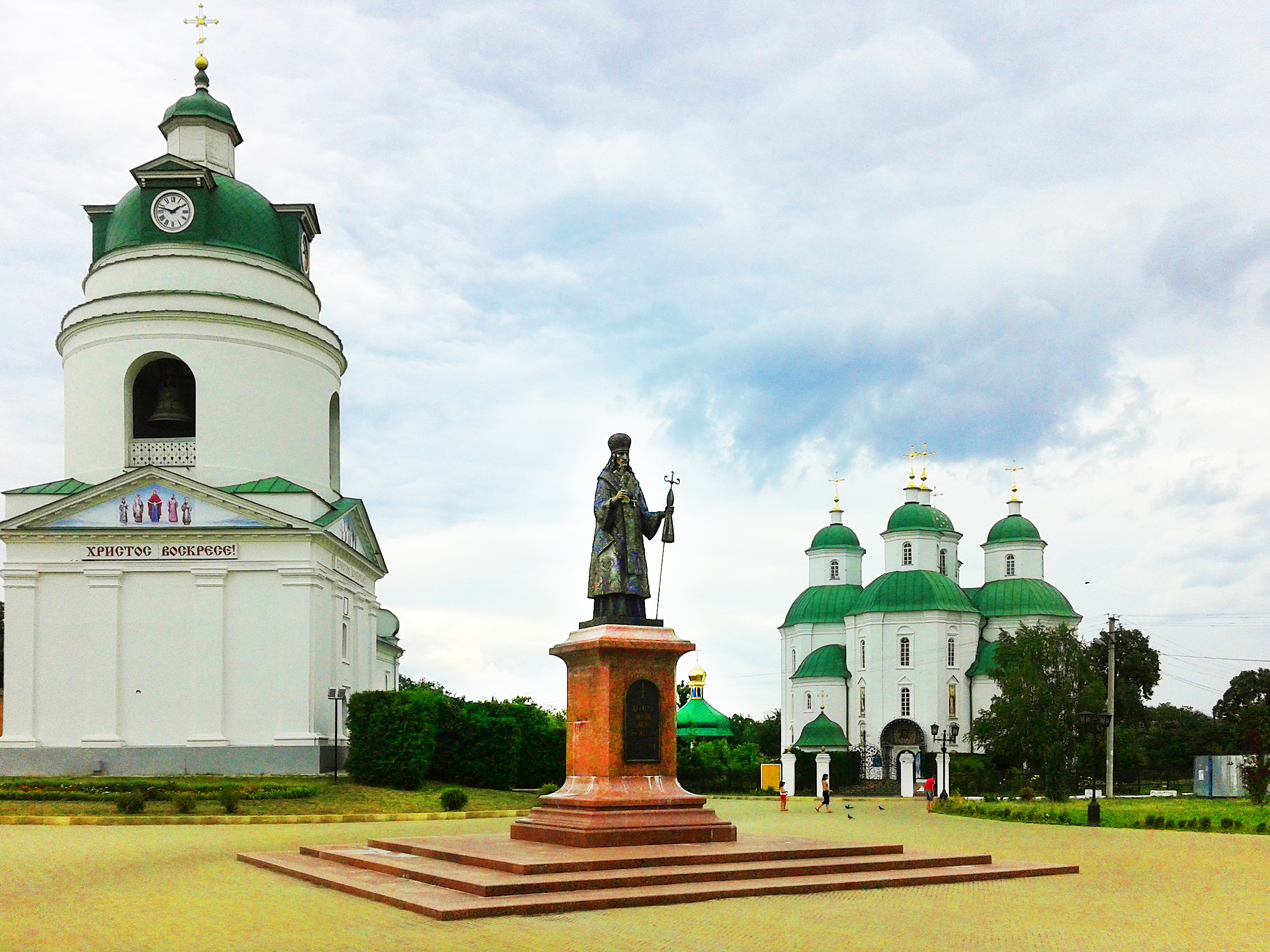 Миколаївська церква (ліворуч), Прилуки, вул. Галаганівська, 16. Спасо-Преображенський собор (праворуч)